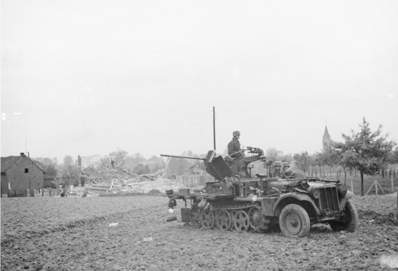 An der Brücke über den Albert-Kanal, auf der Strasse Maastricht-Mopertingen, südlich Veltwezelt. Belgische Seite. 2 cm-Kanone auf Selbstfahrlafette. 11.5.40